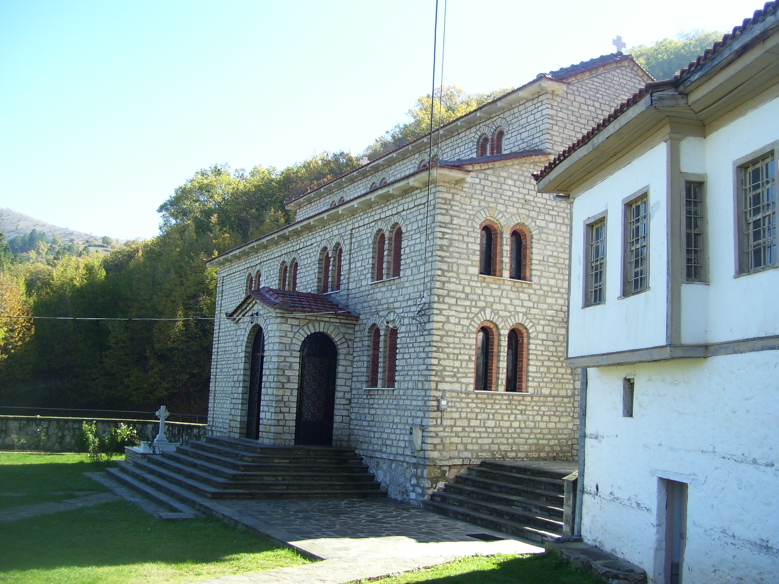 Чуриловският манастир „Свети Николай“ в Гърция.